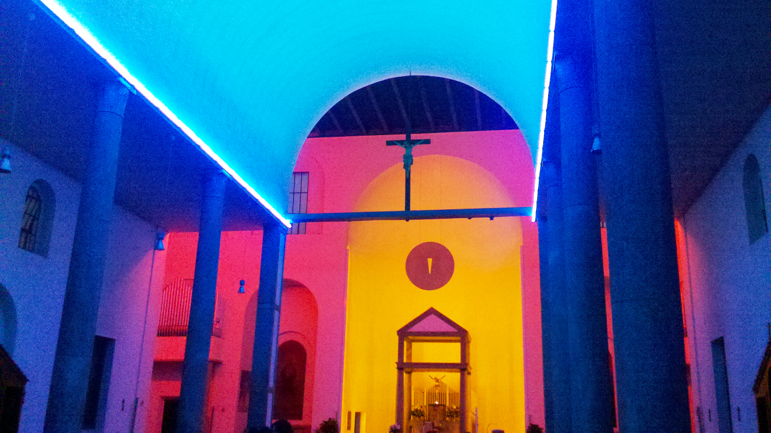 L'opera di Dan Flavin a Milano nella Chiesa di Santa Maria Annunciata in Chiesa Rossa